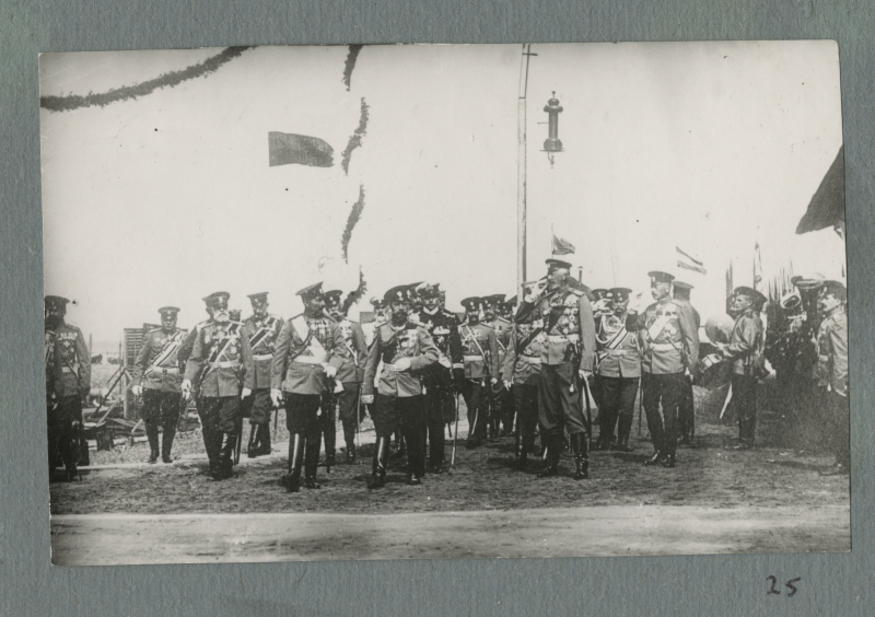 Vene keisri Nikolai II ja saksa keisri Wilhelm II kohtumine Paldiskis 4.–5. juulil 1912. Esireas vasakult Wilhelm II, Nikolai II, prints Adalbert (Nikolai II seljataga), riigikantsler Bethmann-Hollweg.